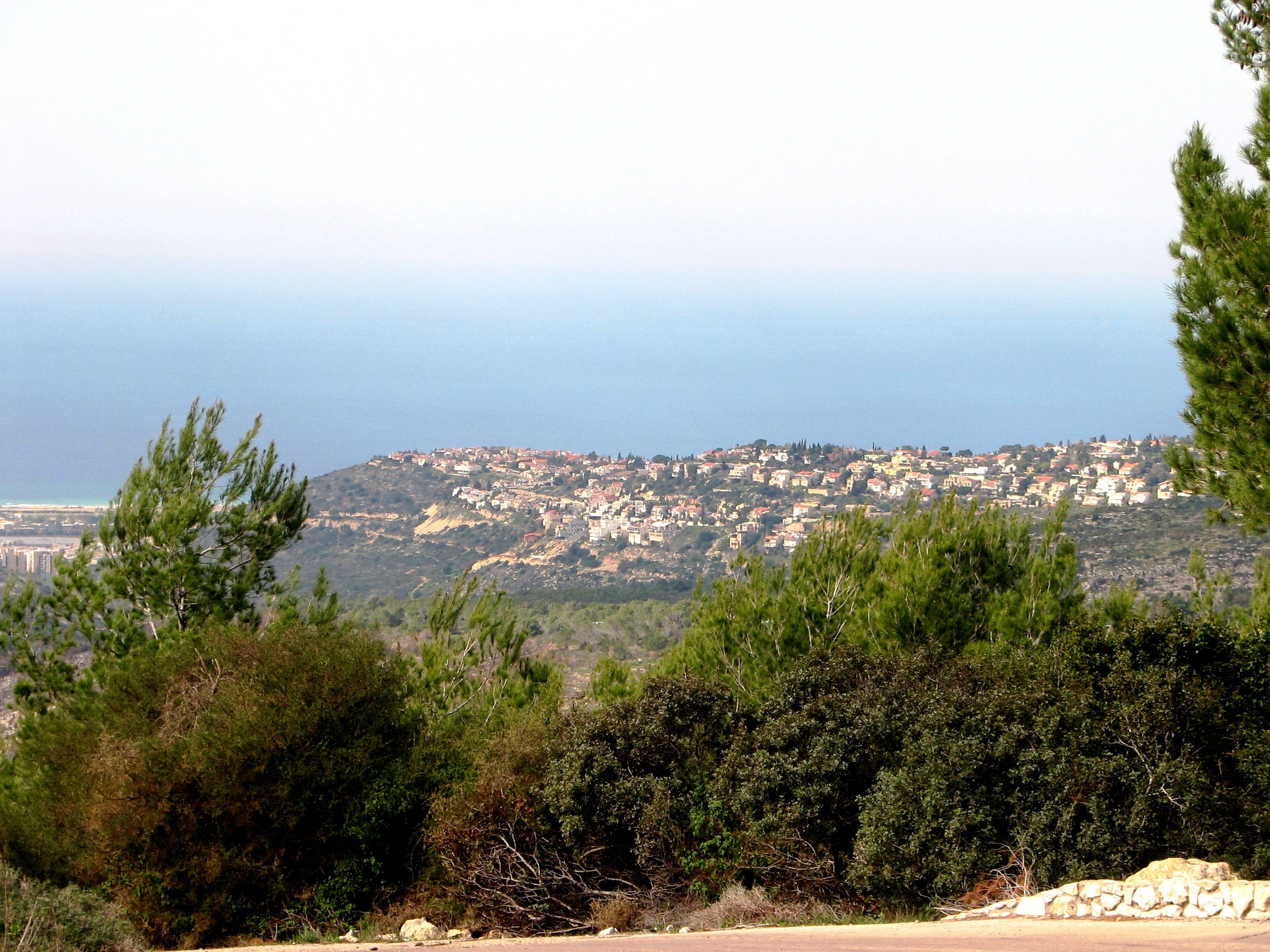 Denya, Haifa דניה היא שכונת וילות על הר הכרמל ליד אוניברסיטת חיפה. שמה הרשמי הוא "הוד הכרמל" תצפית מחניון הצוק